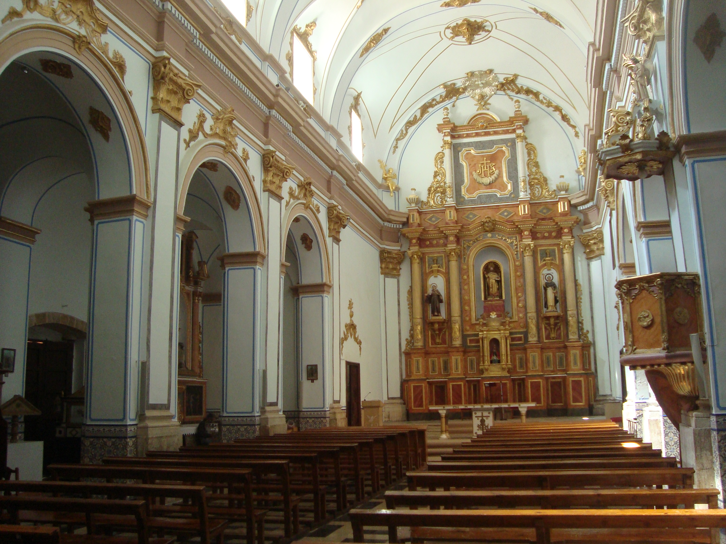 Església parroquial de Sant Bartomeu (la Serra d'en Galceran) 05.105-001.